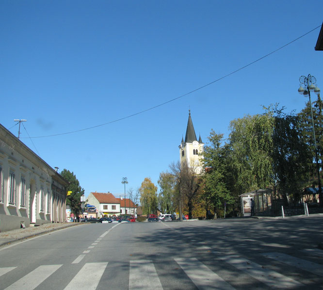 Sveti Ivan Zelina, Zagrebačka županija